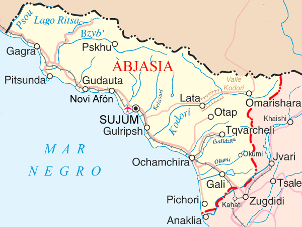 Mapa derivado del File:Abkhazia detail map2.png